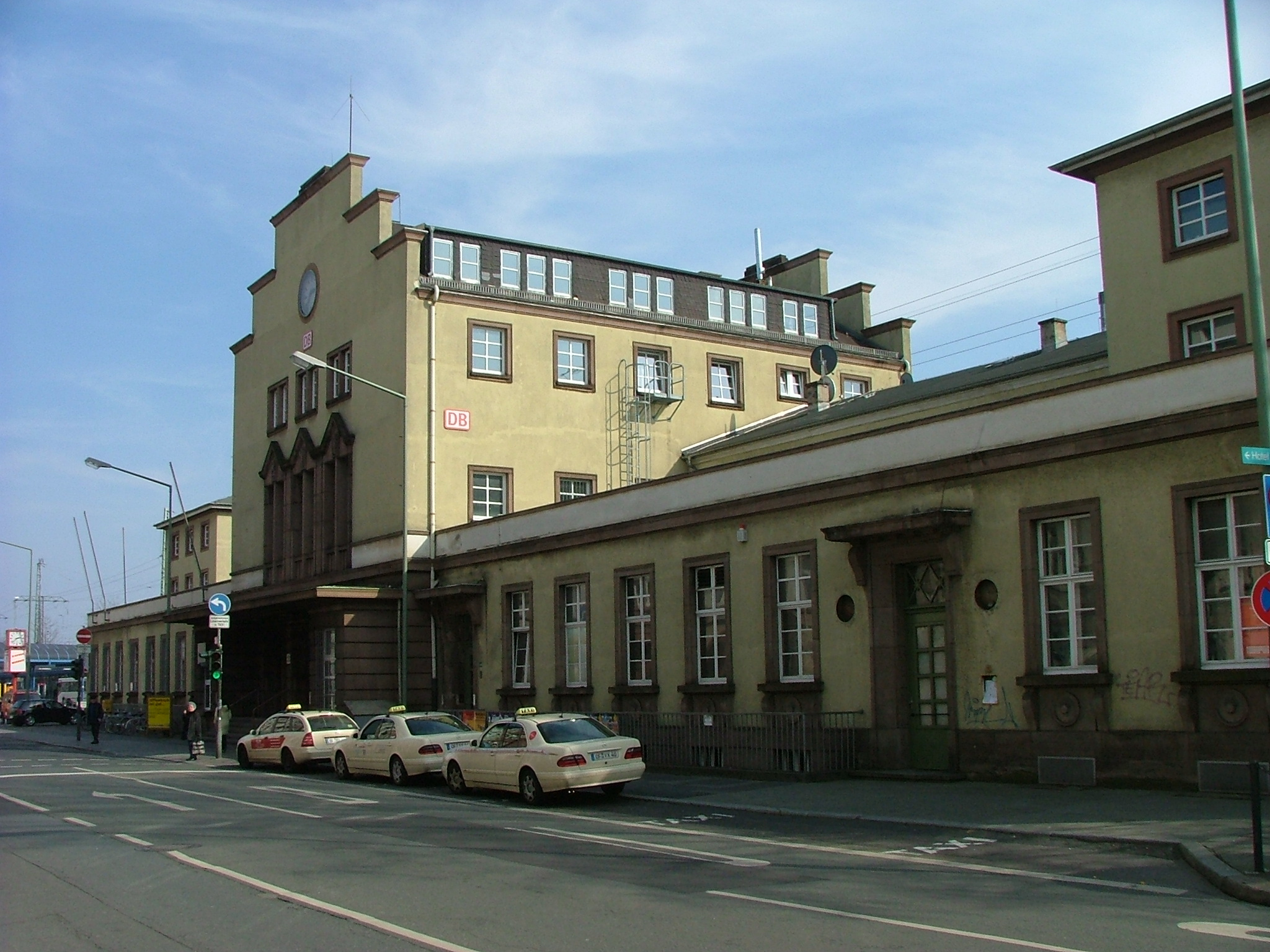 Hauptbahnhof Offenbach am Main This is the photograph of an architectural monument. It is part of the list of cultural monuments of Offenbach am Main